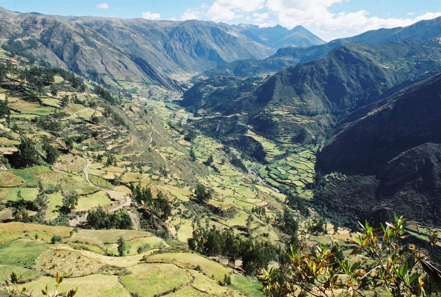 Valle de Patívilca,hier der Río Ainín im Departament Ancash/Peru. 2001 von Uta Freund